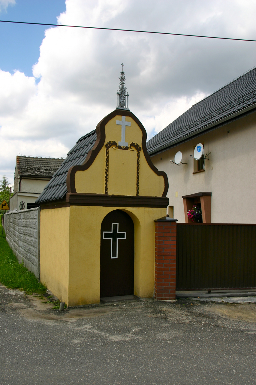 Ogiernicze (dodatkowa nazwa w j. niem. Legelsdorf) – wieś w Polsce położona w województwie opolskim, w powiecie prudnickim, w gminie Biała.